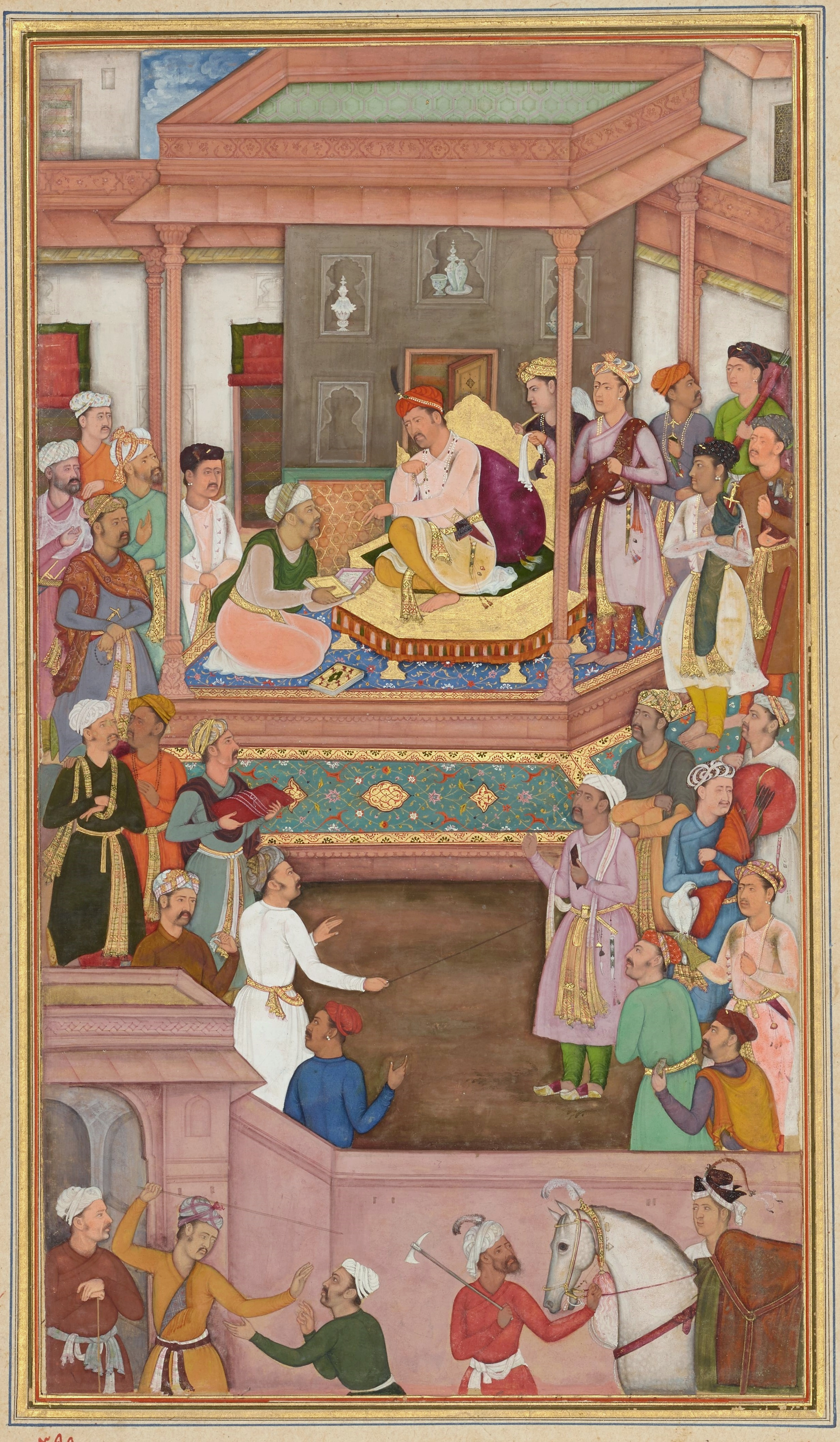 Abu'l-Fazl ibn Mubarak presenting Akbarnama to the Grand Mogul Akbar. Mughal miniature.